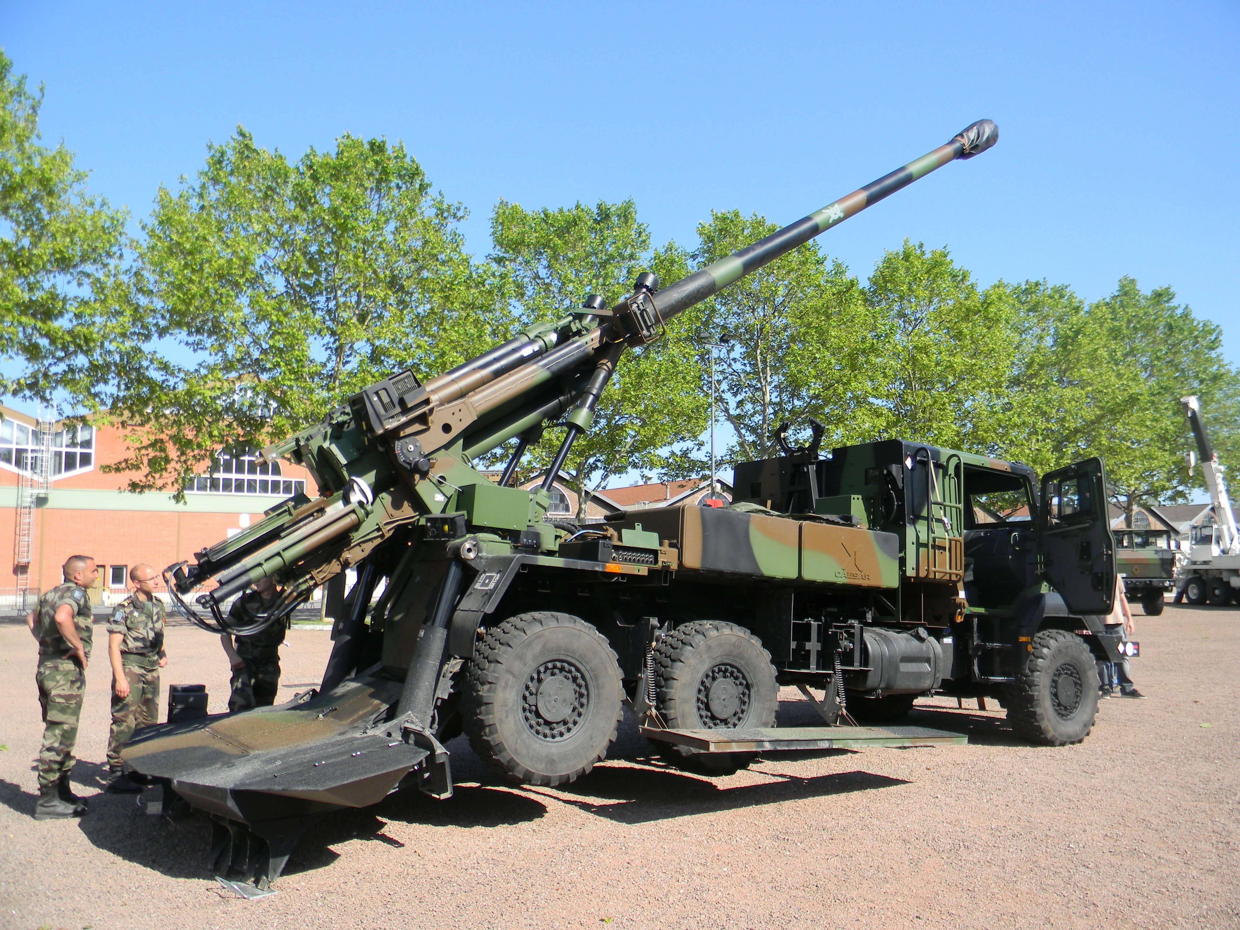 Journées portes ouvertes du quartier général Sabatier à Lyon le 15 et 16 juin 2013.